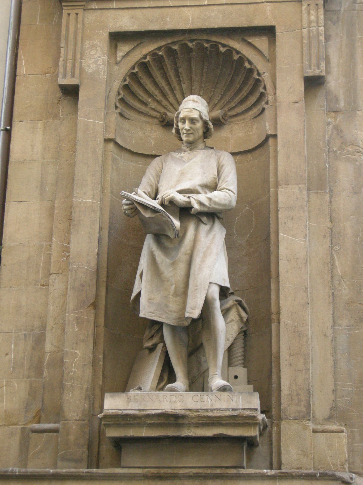 Loggia del mercato nuovo, bernardo cennini2